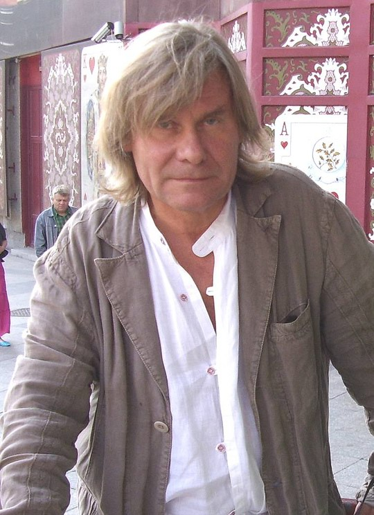 Filip Bajon (ur. 25 sierpnia 1947 w Poznaniu) - polski scenarzysta oraz reżyser filmowy i teatralny.